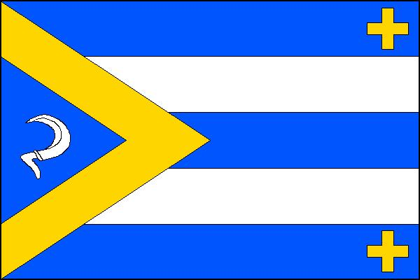 Vlajka obce Tuhaň (okres Česká Lípa)